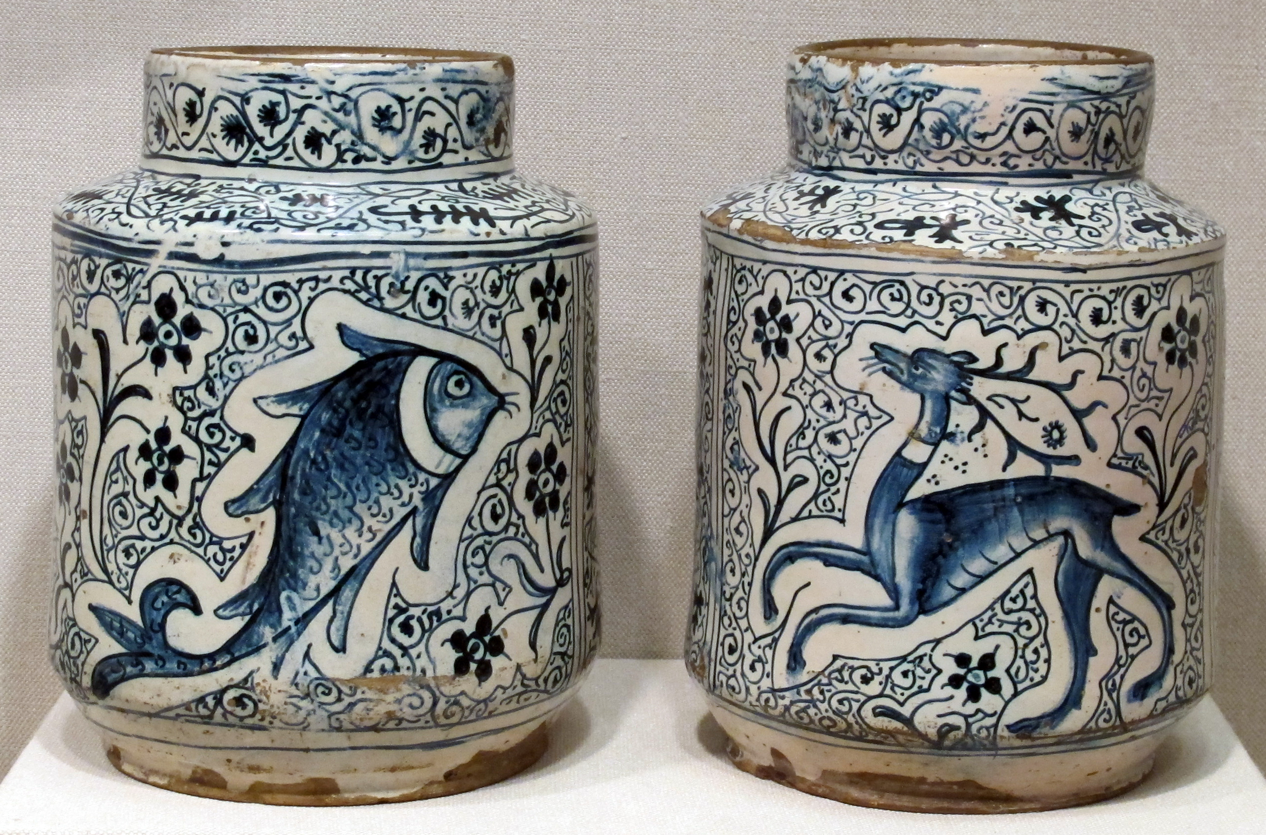 Objects d'art nel Metropolitan Museum of Art